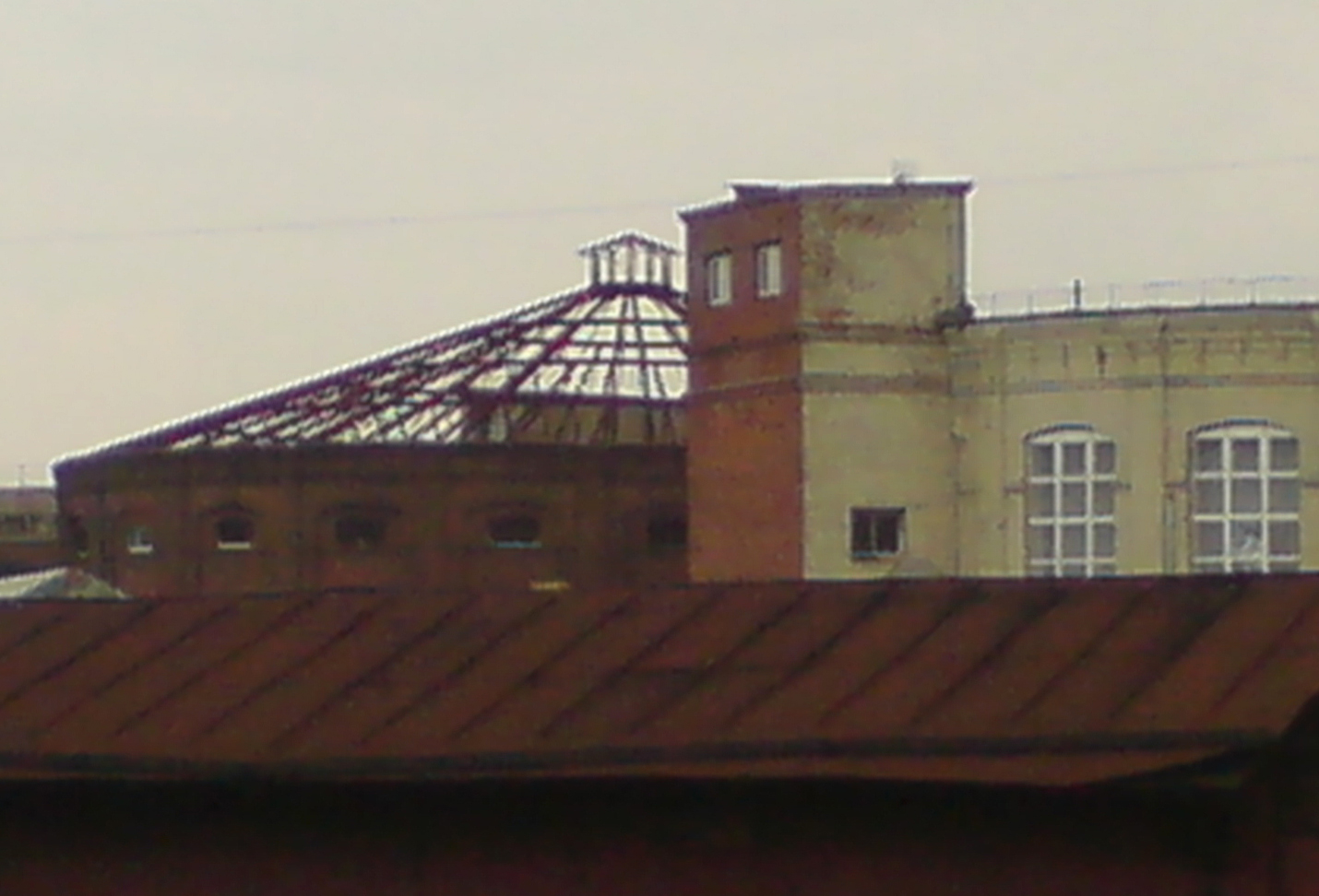 Вид на шуховские перекрытия газгольдера Московского газового завода со стороны платформ Курского вокзала.